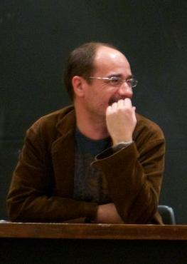 Ariel Torres, periodista argentino